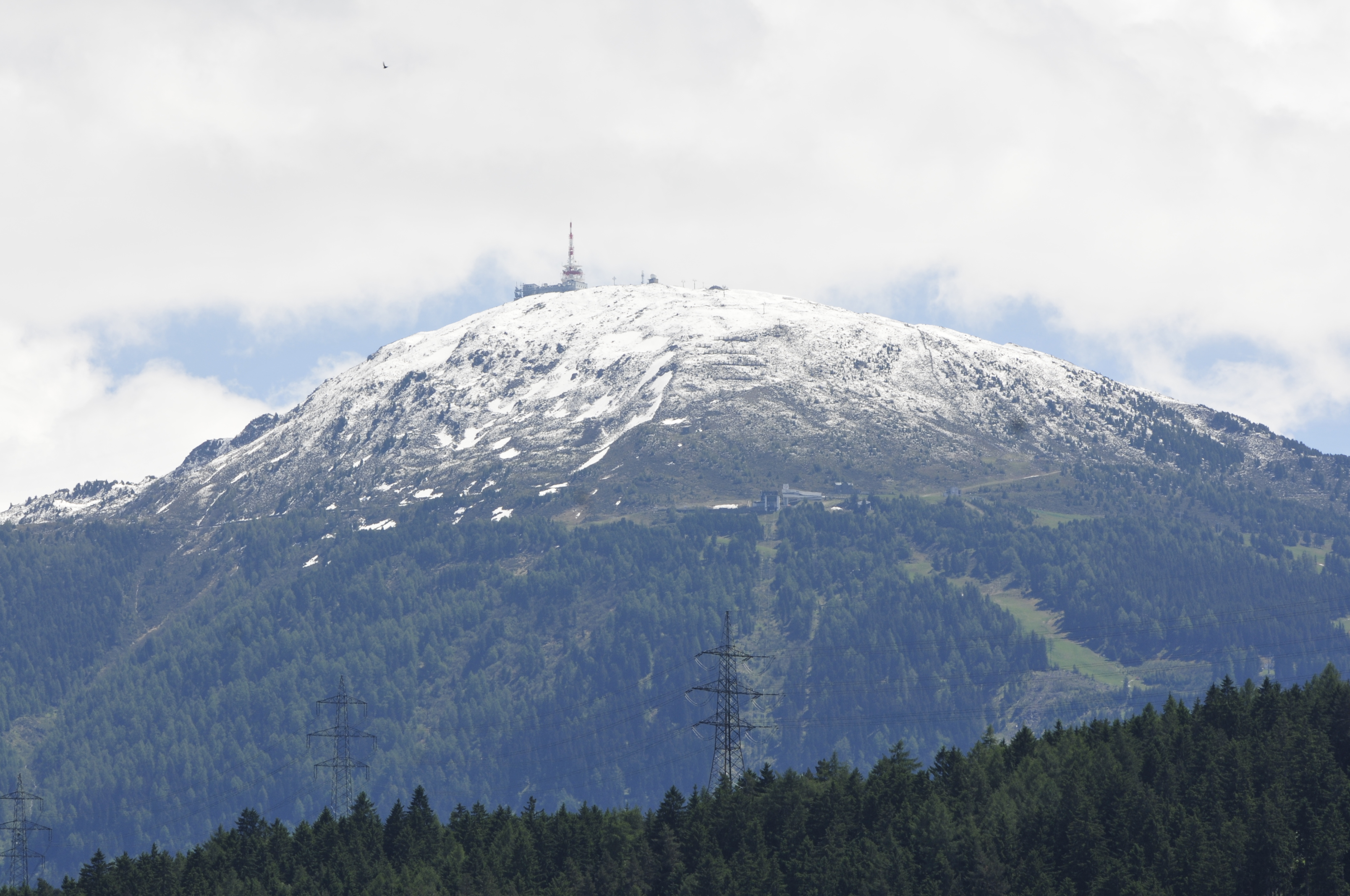 Patscherkofel von Innsbruck The making of this document was supported by Wikimedia Austria. Im Rahmen des Fußballländerspiels Österreich gegen Rumänien bin ich einige Stunden durch Innsbruck gefahren und habe Aufnahmen gemacht, die vielleicht mal gebraucht werden könnten. --Ralf Roleček 11:20, 10 June 2012 (UTC) The making of this document was supported by Wikimedia Austria.